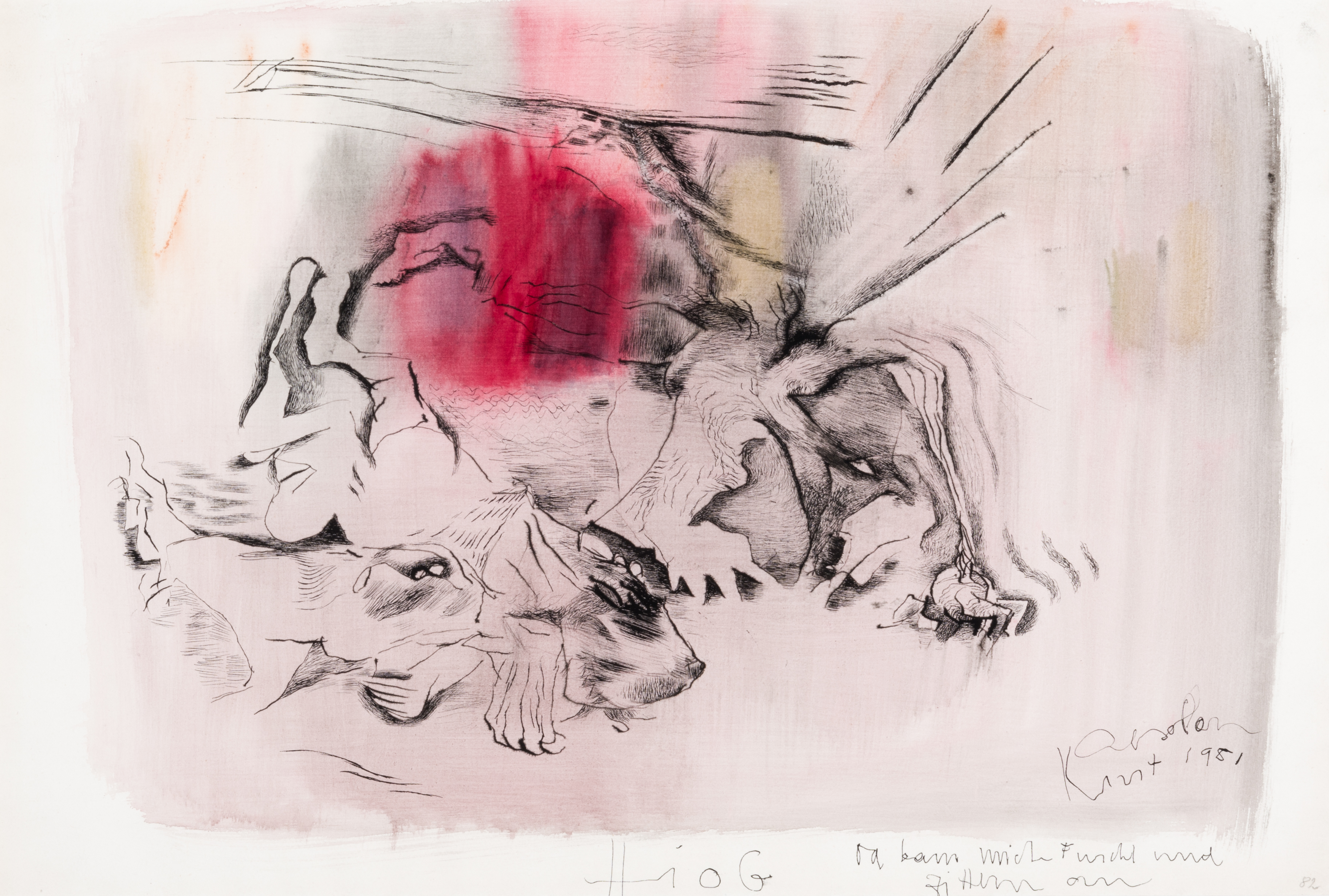 Zeichnung